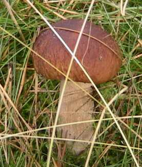 Baravykas (tikriausiai)